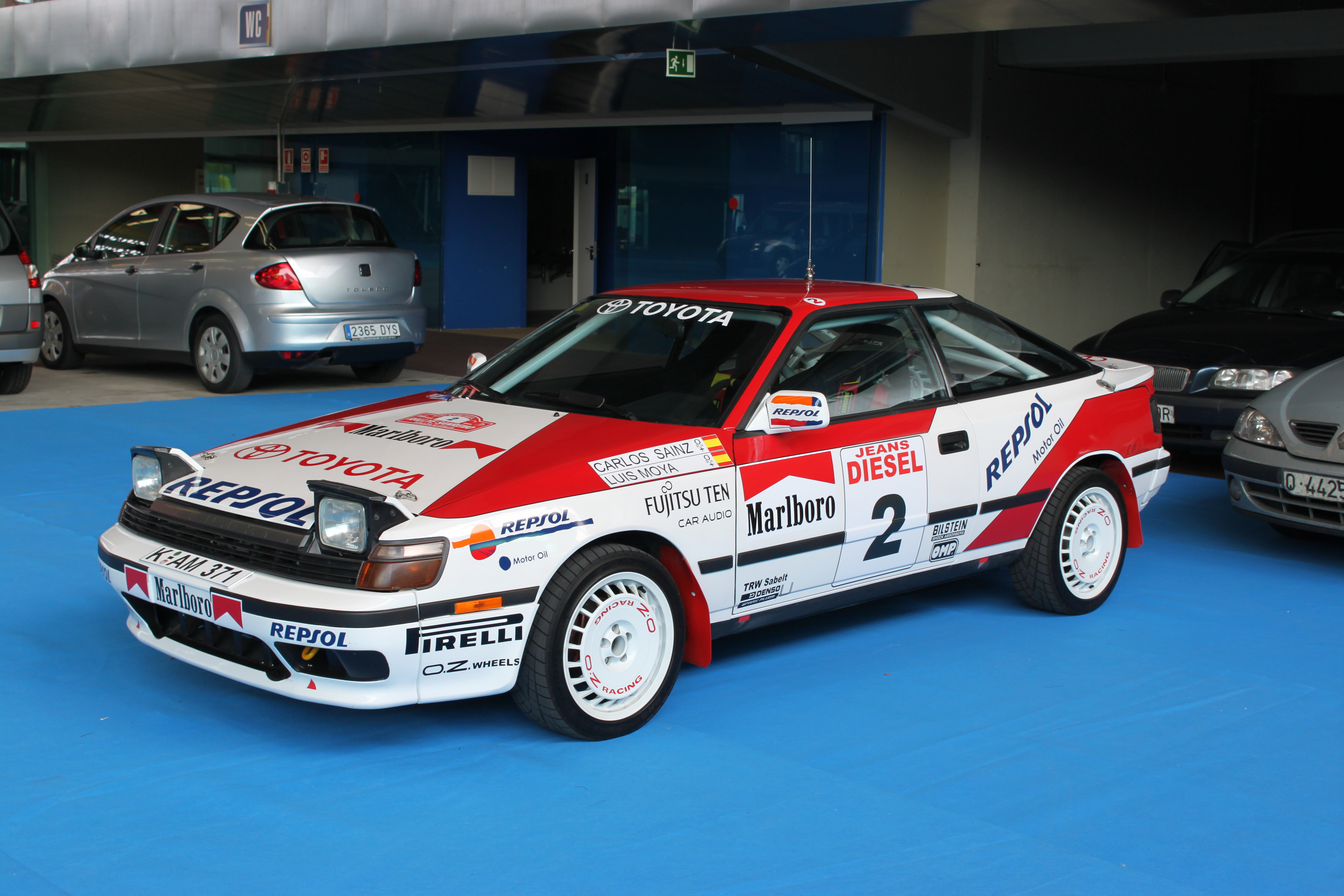 Toyota celica turbo 4wd Carlos Sainz Luis Moya San remo 1991